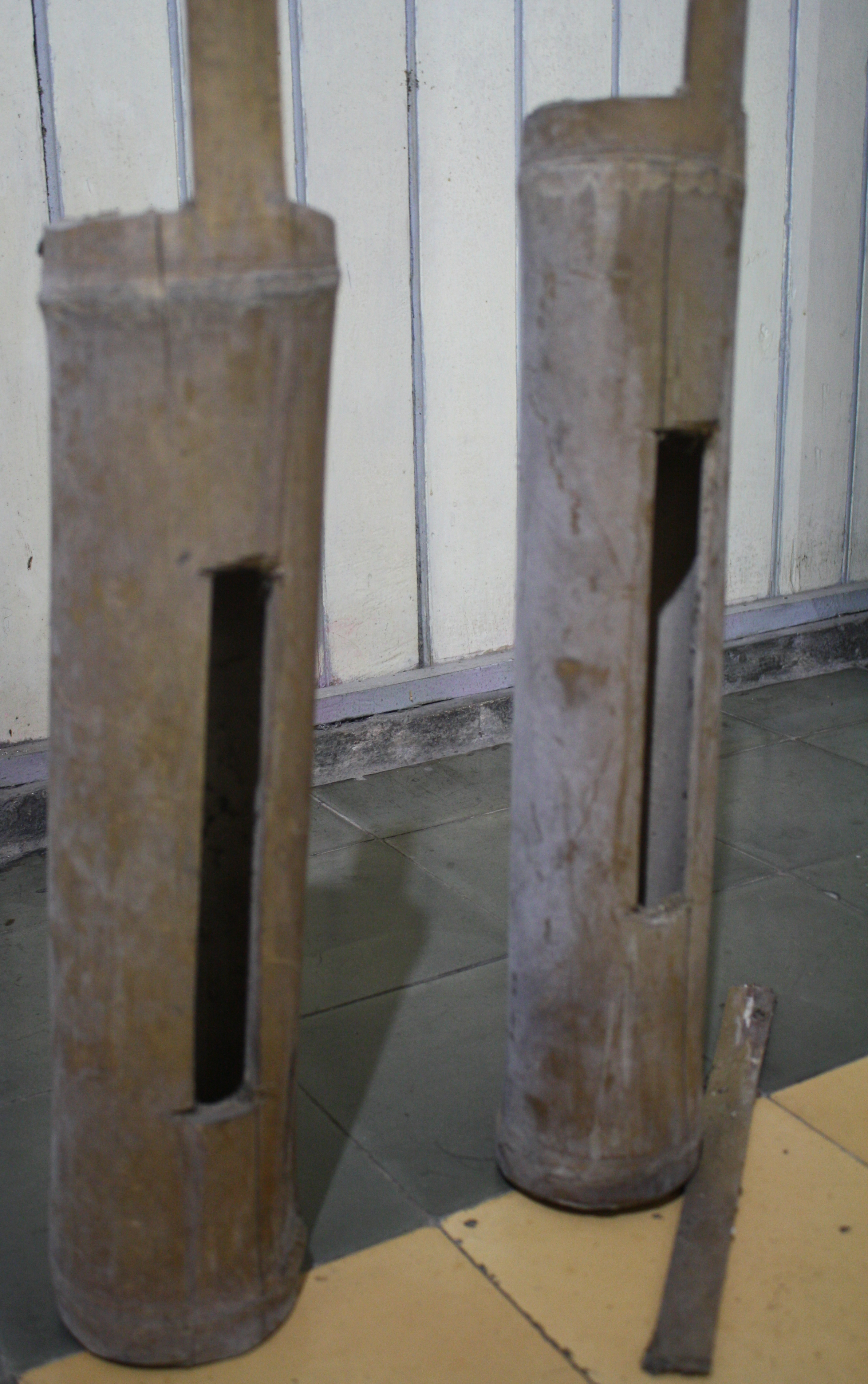 Kentongan yang terbuat dari bambu